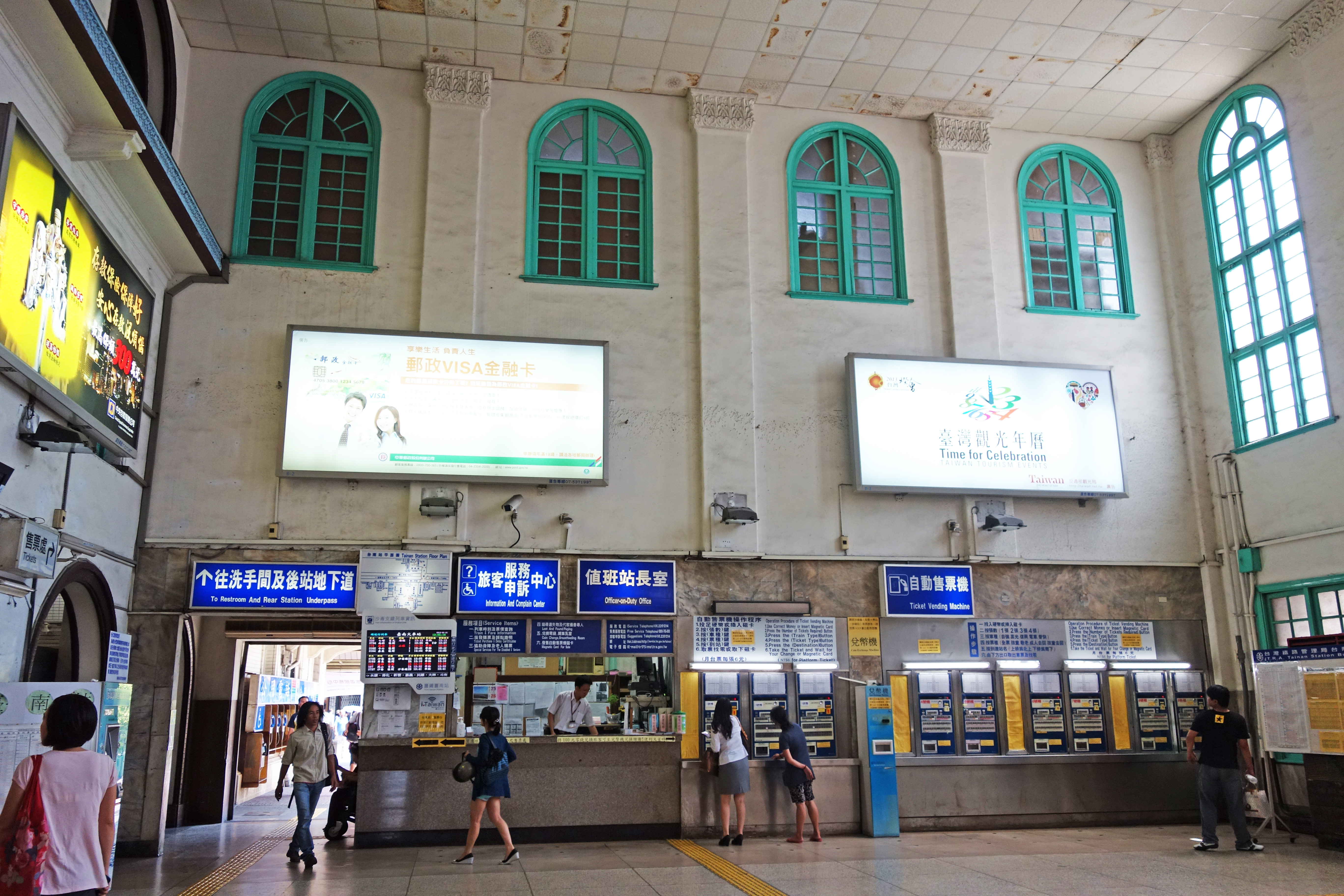 台鉄 台南駅 （前站） 駅舎2階が旧ホテル部分（復元予定）